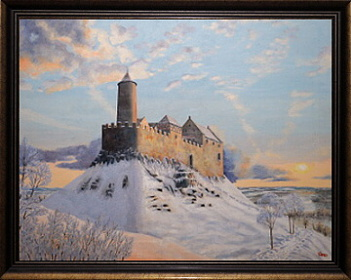 Hrad Volfštejn, olej na plátně 94x72 cm